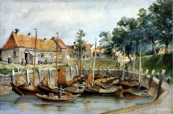 Aquarelle du peintre néerlandais Gerrit Jan Smits, intitulée Schokker scheepstypen in de binnenhaven. Œuvre exécutée en 1870.